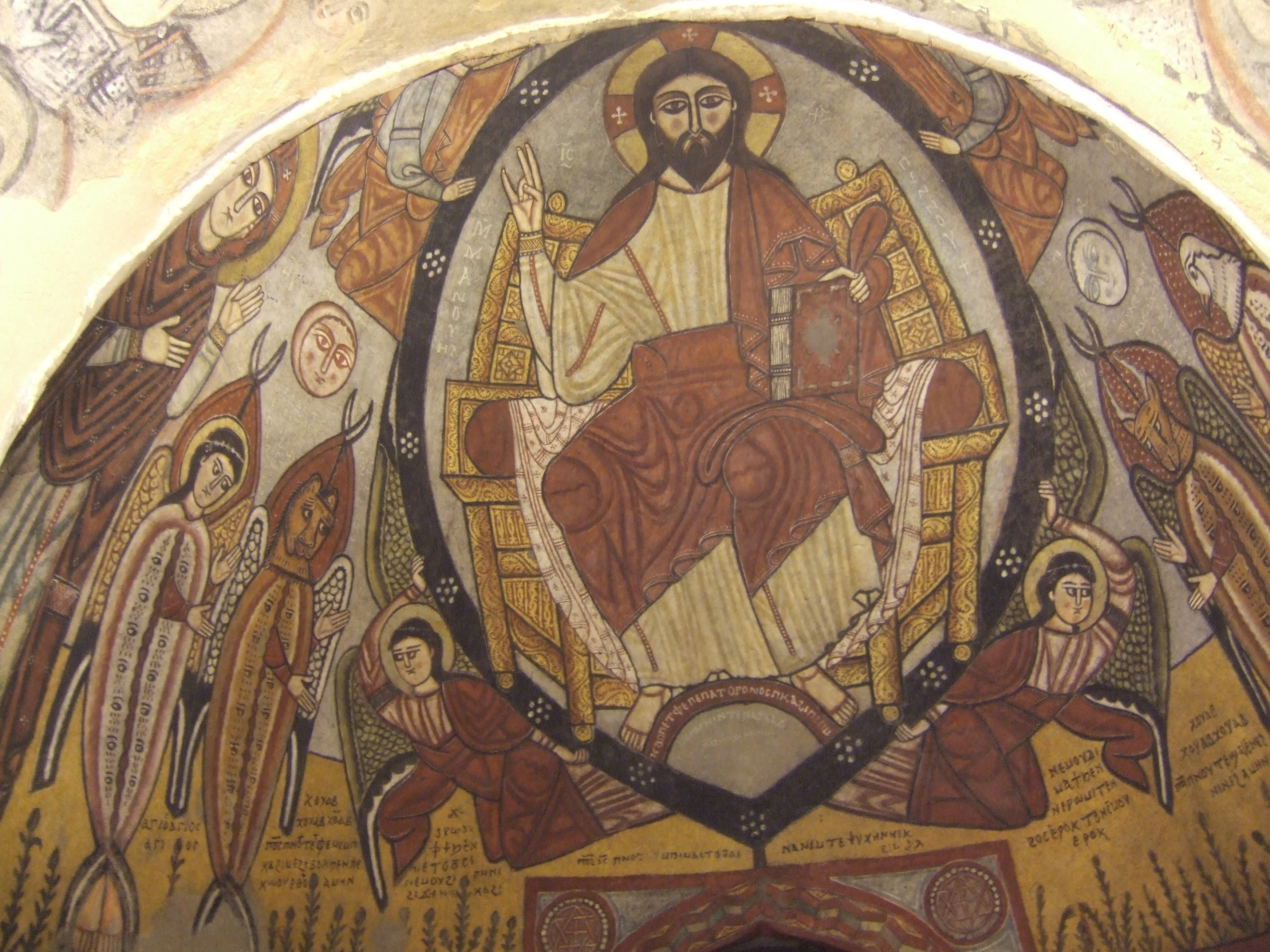 Sono l'autore دير_الأنبا_أنطونيوس Monastery of Saint Anthony Monaĥejo de Sankta Antonio Monastère Saint-Antoine Monastero di Sant'Antonio Klooster van Sint Antonius Монастир Святого Антонія Великого